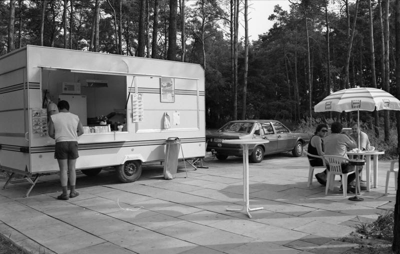 11.-18.8.1991 Bundesland Sachsen-Anhalt Wenzlow/Wollin, Autobahn-Parkplatz an Abfahrt Wenzlow/Wollin